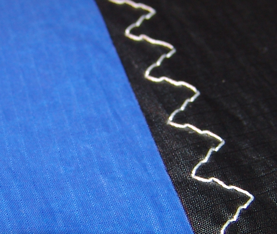 Leichtes Segeltuch (Gennaker, Spinnaker)